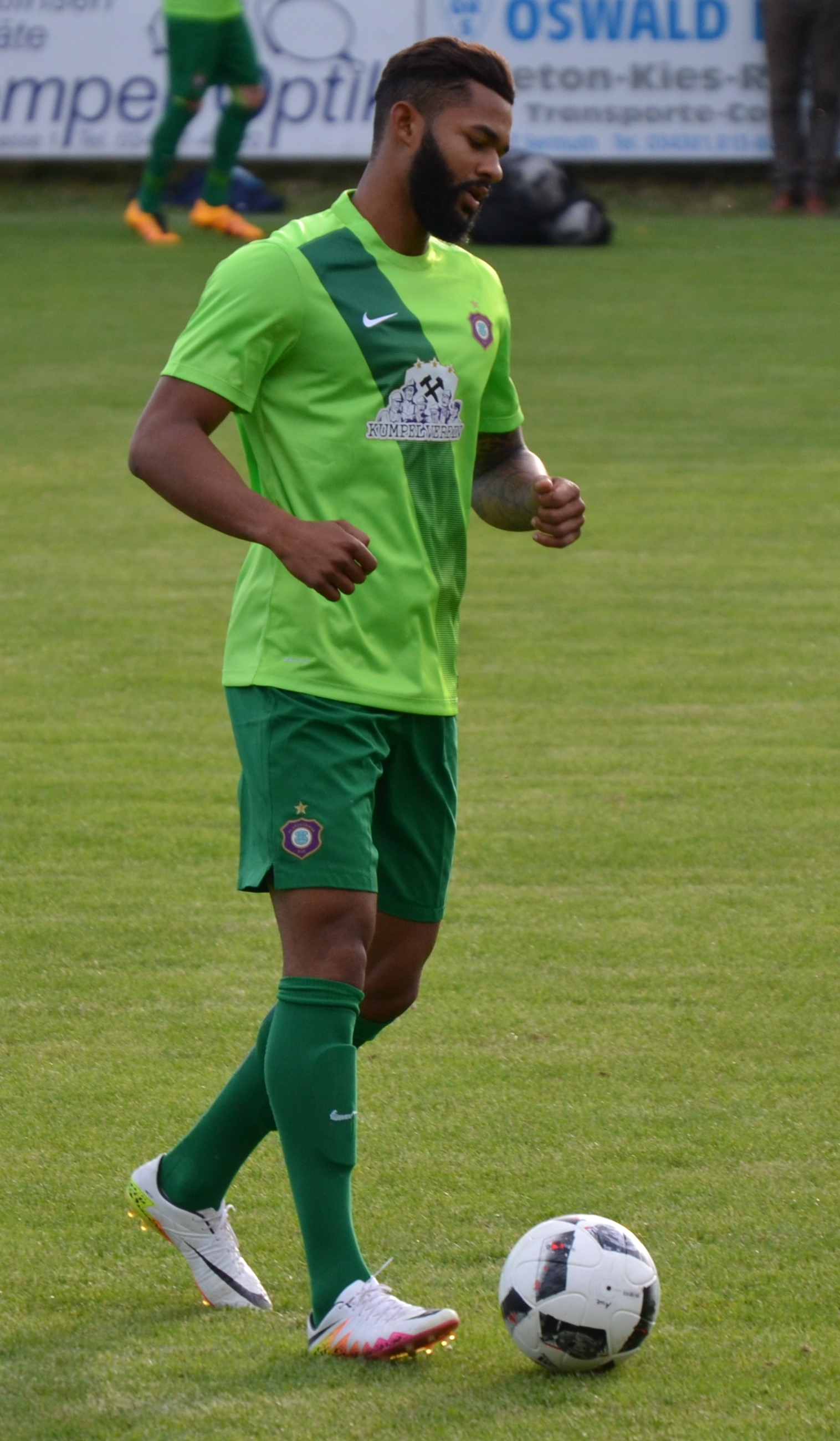 Cebio Soukou beim Freundschaftsspiel von Erzgebirge Aue gegen den HFC Colditz im Juni 2016